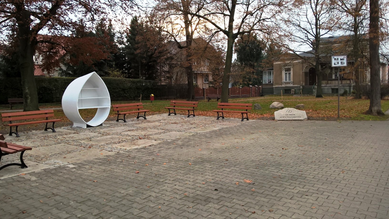 Skwer Czytelników w Szprotawie zbudowano w 2019 r. w miejscu zburzonego w 2016 r. pomnika Polsko-Radzieckiego Braterstwa Broni.